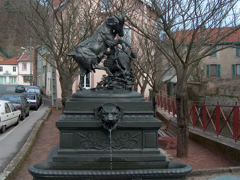 Fontaine Chèvre de Raon-l'Étape, dans les Vosges, en France .